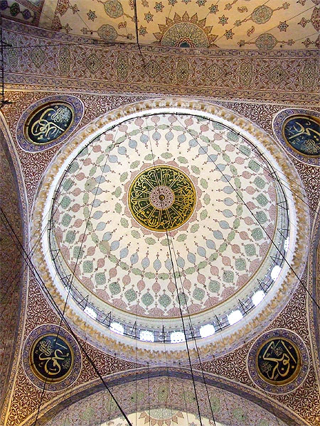 Stambul - Nowy Meczet - wewnętrzne zdobienie kopuły